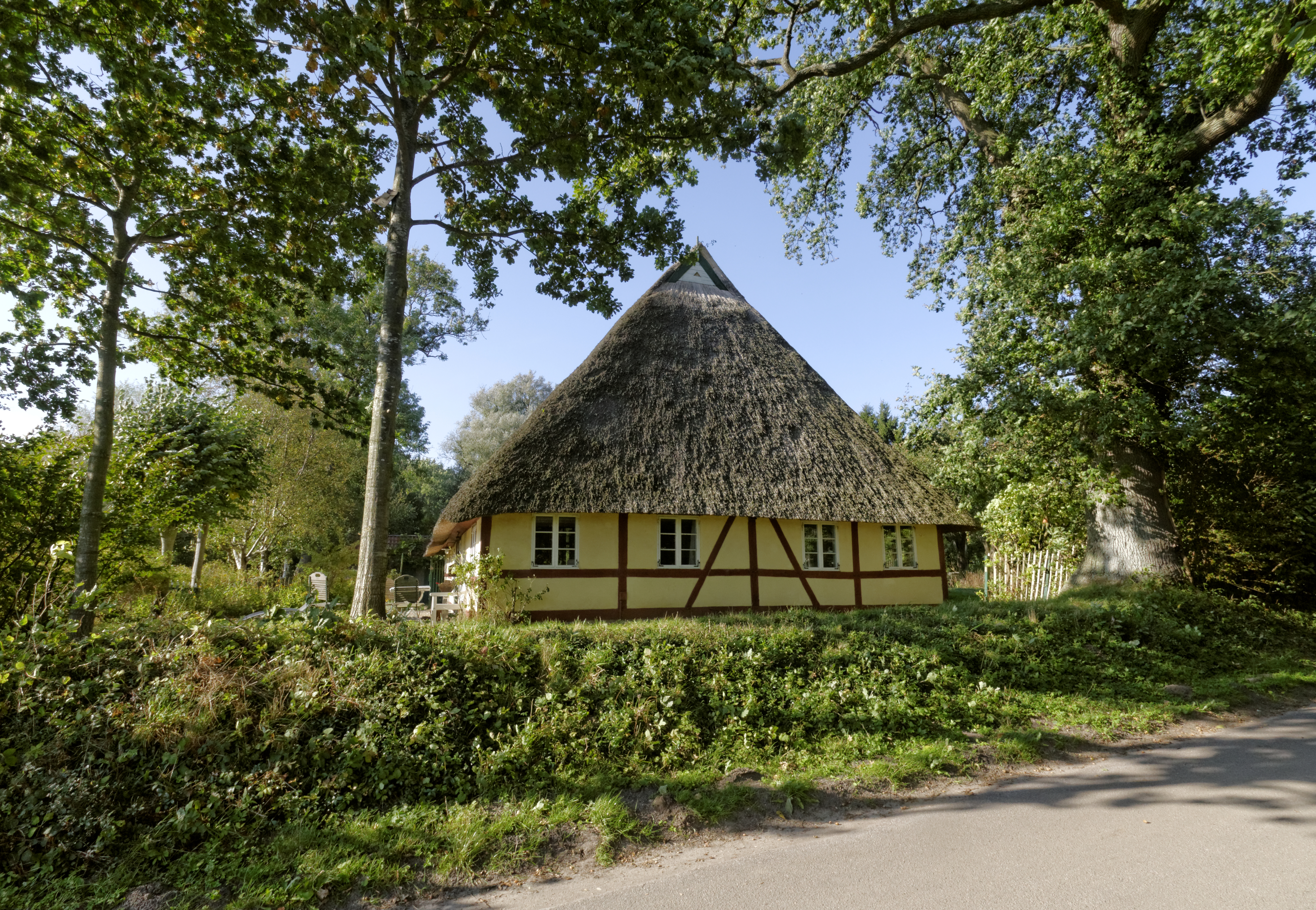 Dänischenhagen-Freidorf, Reetbrook 2; ehem. Rauchkate